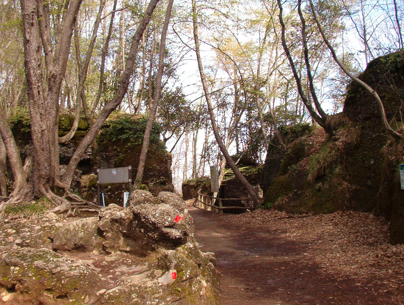 Pietre strette, Parco di Portofino, Liguria, Italia